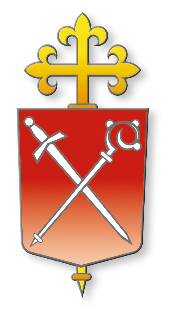 Armoiries du diocèse de Sion